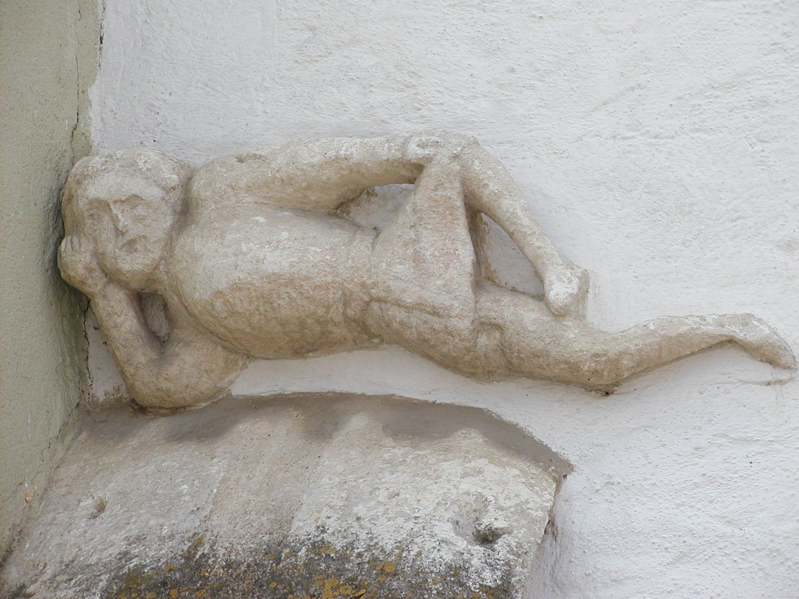 Detail des Gebäudes Hauptplatz 13 in Sitzendorf an der Schmida